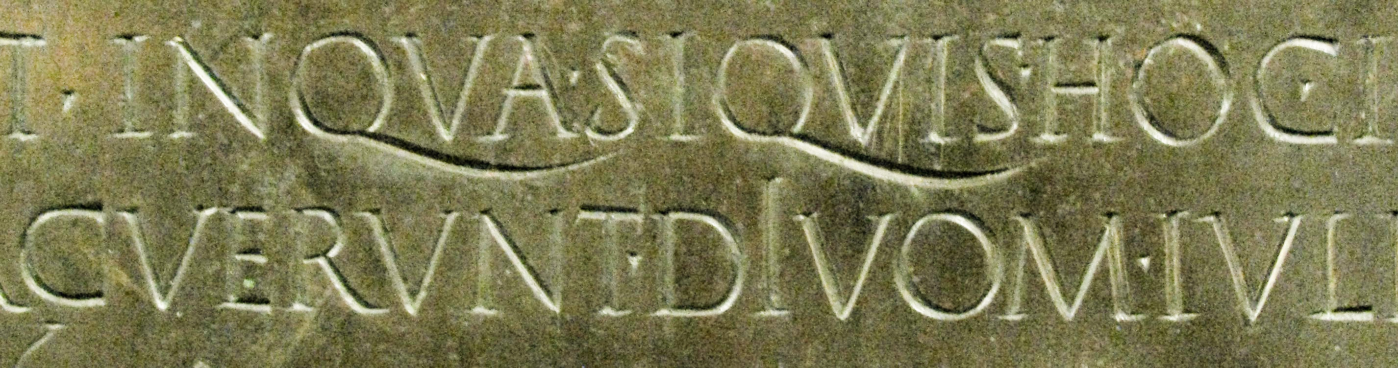 détail de la Table claudienne, colonne de droite, lignes 10 (IN QVA SI QVIS HOC) et 11 (exerCVREVNT DIVOM IVL) du dernier paragraphe - Musée gallo-romain de Fourvière - CIL XIII 1688, CAG 69/2, Lyon, pp. 304-306